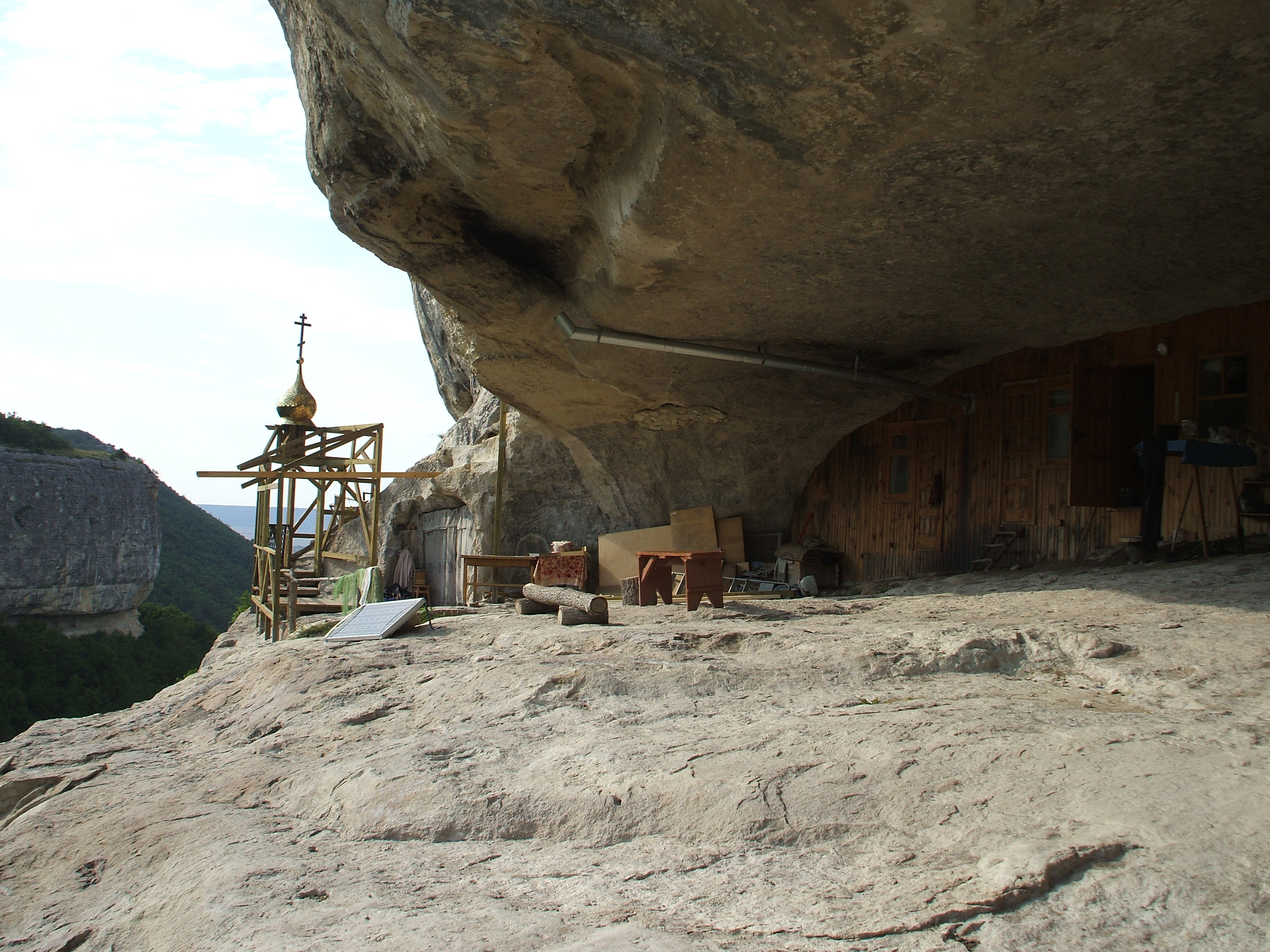 Печерний монастир Челтер-Коба